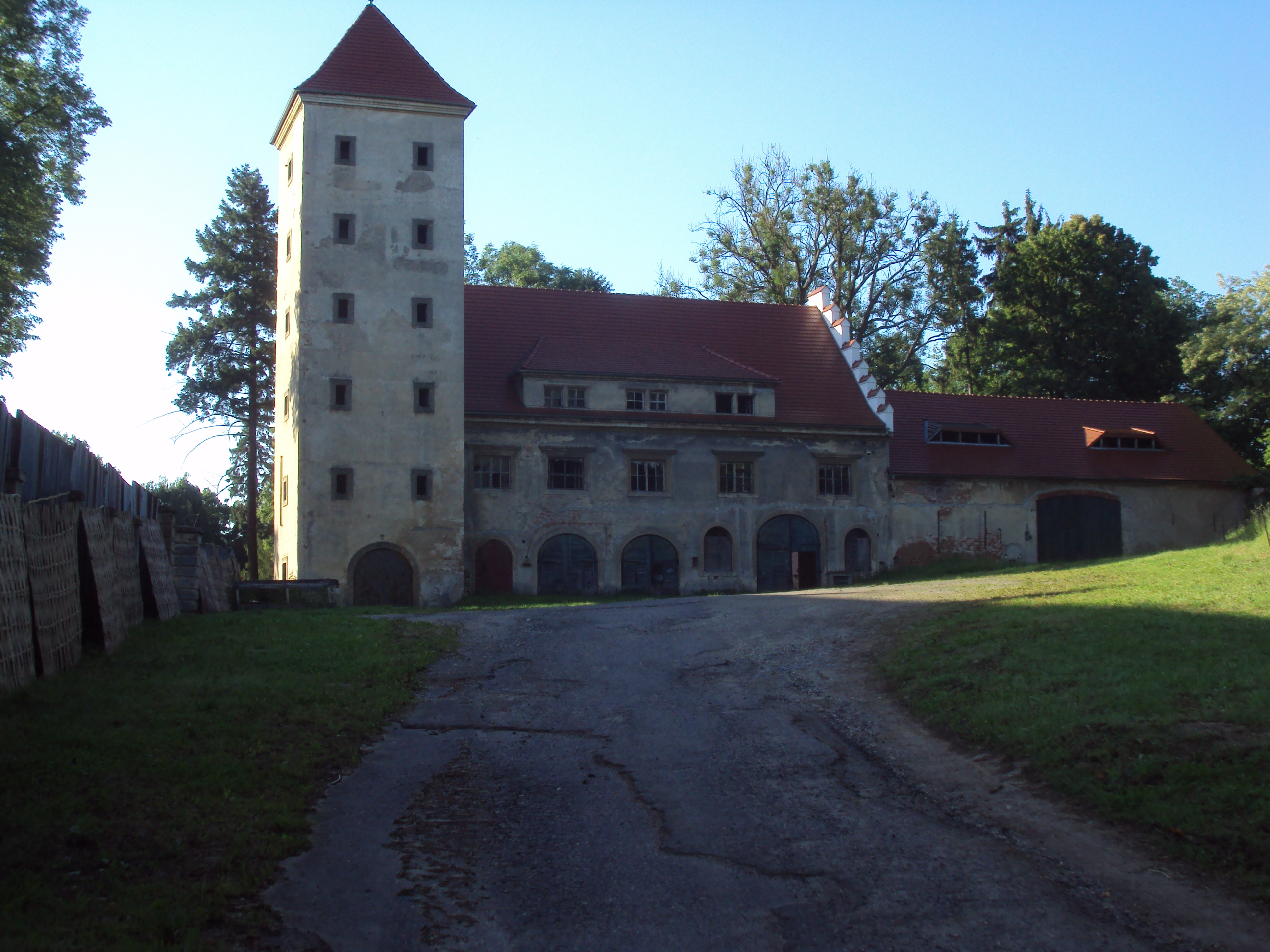 Areál zámku, horní budova